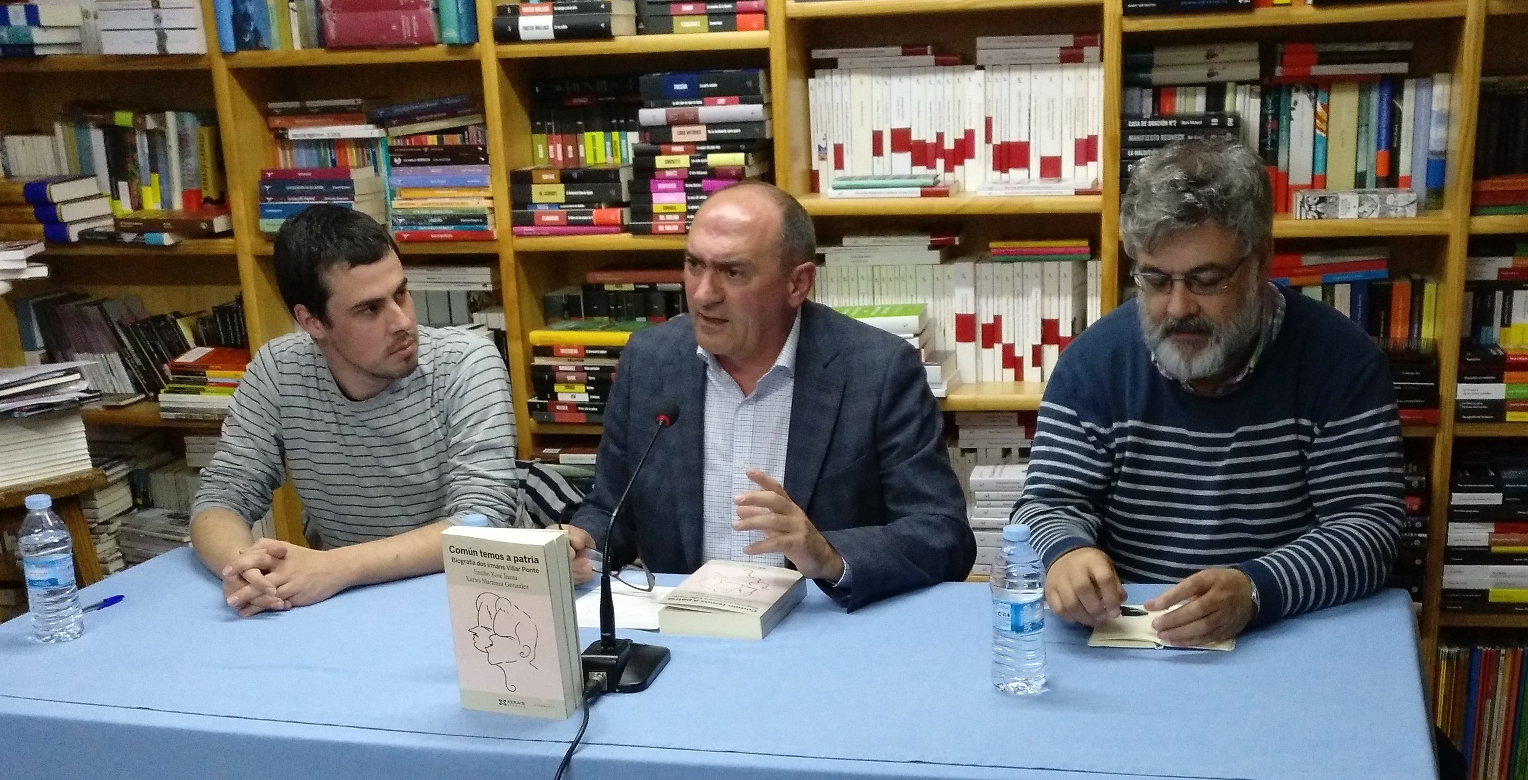 Xurxo Martínez, Anxo Angueira e Emilio Insua na presentación de Común temos a patria. Biografía dos irmáns Villar Ponte. Libraría Paz de Pontevedra, 15/05/2018